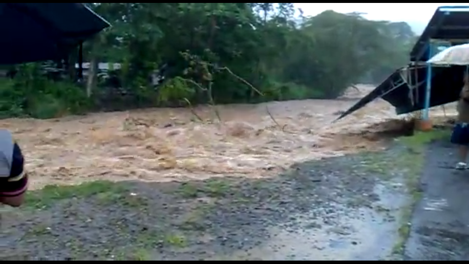 La furia del siquirres